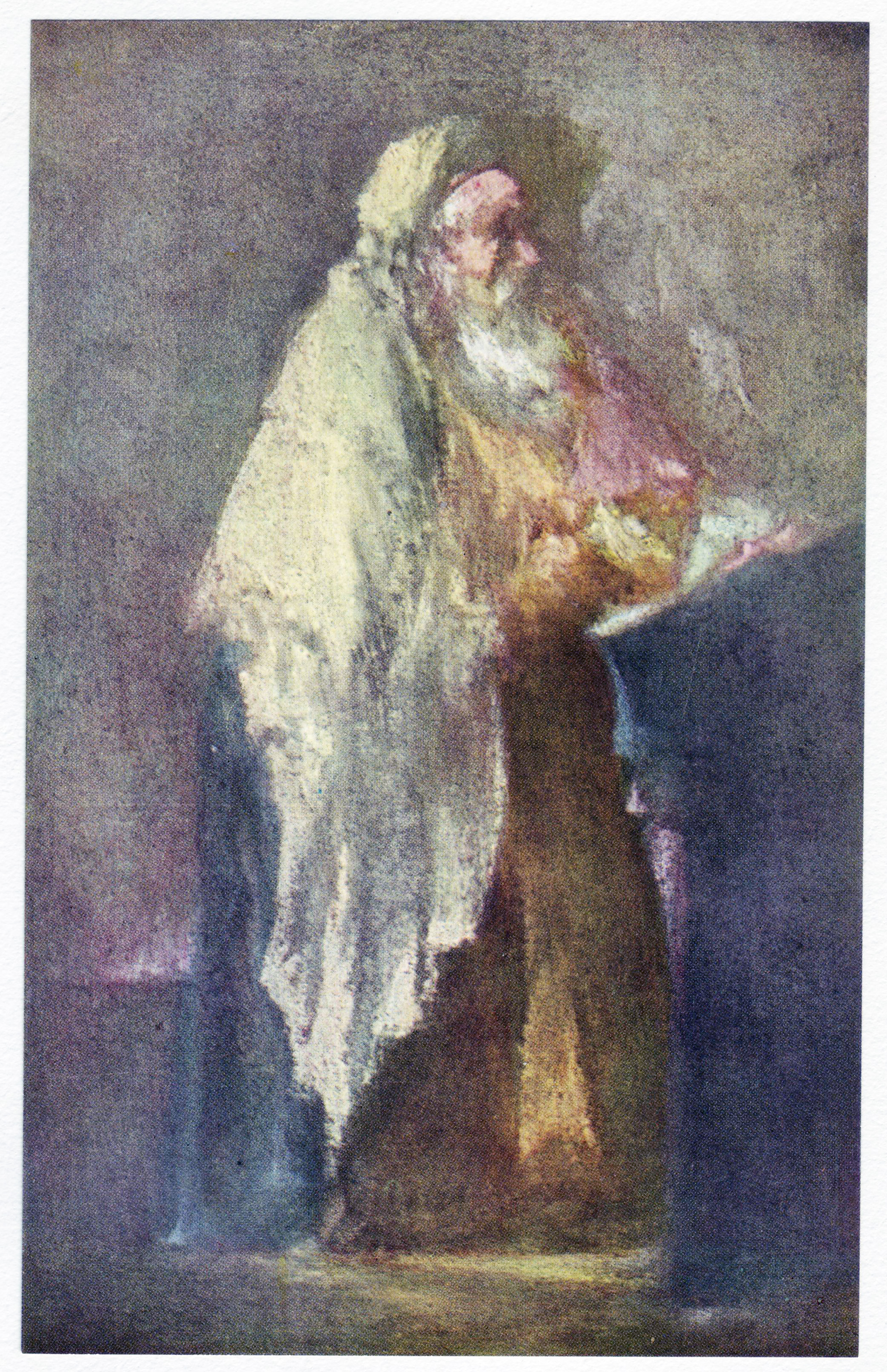 Goldberg_prayer.jpg